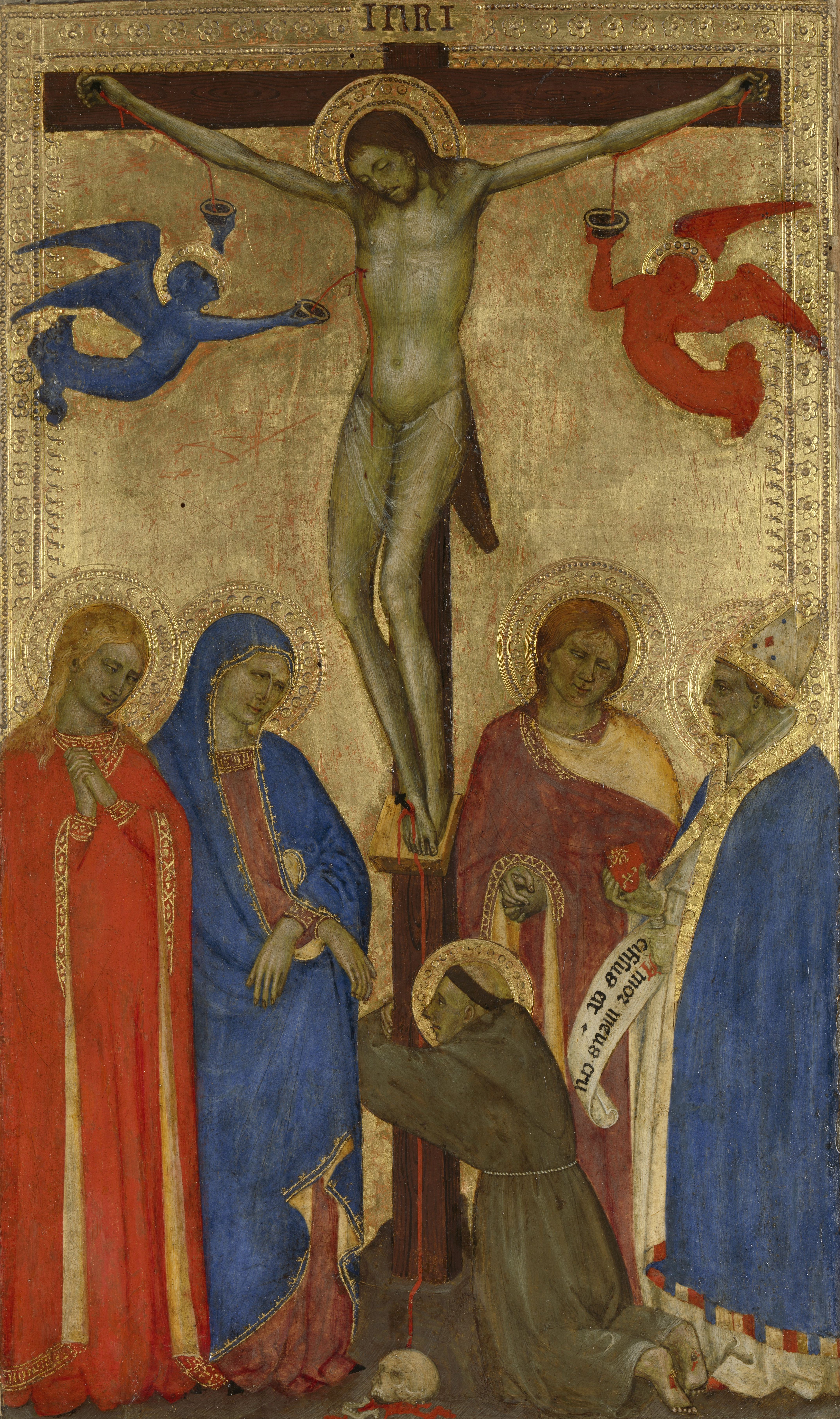 Christus aan het kruis. Onder het kruis staan links de heilige Maria Magdalena en Maria. De heilige Franciscus van Assisi knielt en omhelst het kruis. Rechts staan Johannes en de heilige Ignatius van Antiochië. Twee engelen vangen het bloed van Christus op in kelken. Rechts een banderol met tekst.; Giovanni da Milano (werkzaam 1346–1369), Florence, ca. 1360, tempera op paneel